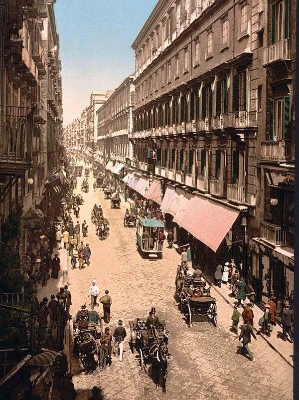 Cartolina ricolorata fine '800